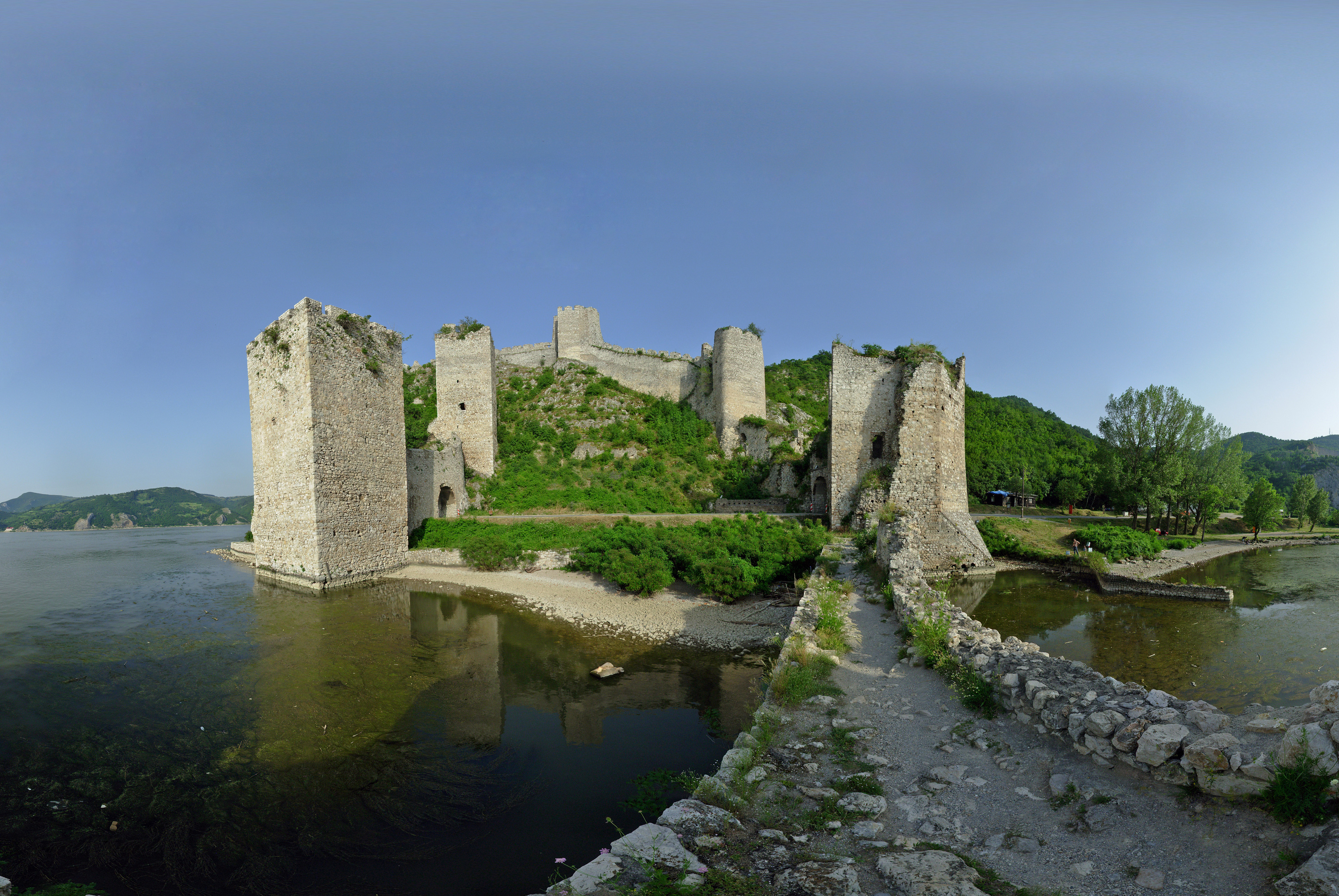 Тврђава на Дунацу надомак Голупца